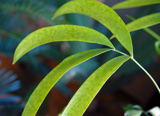 Zamia Roezlii in a Czech private collection